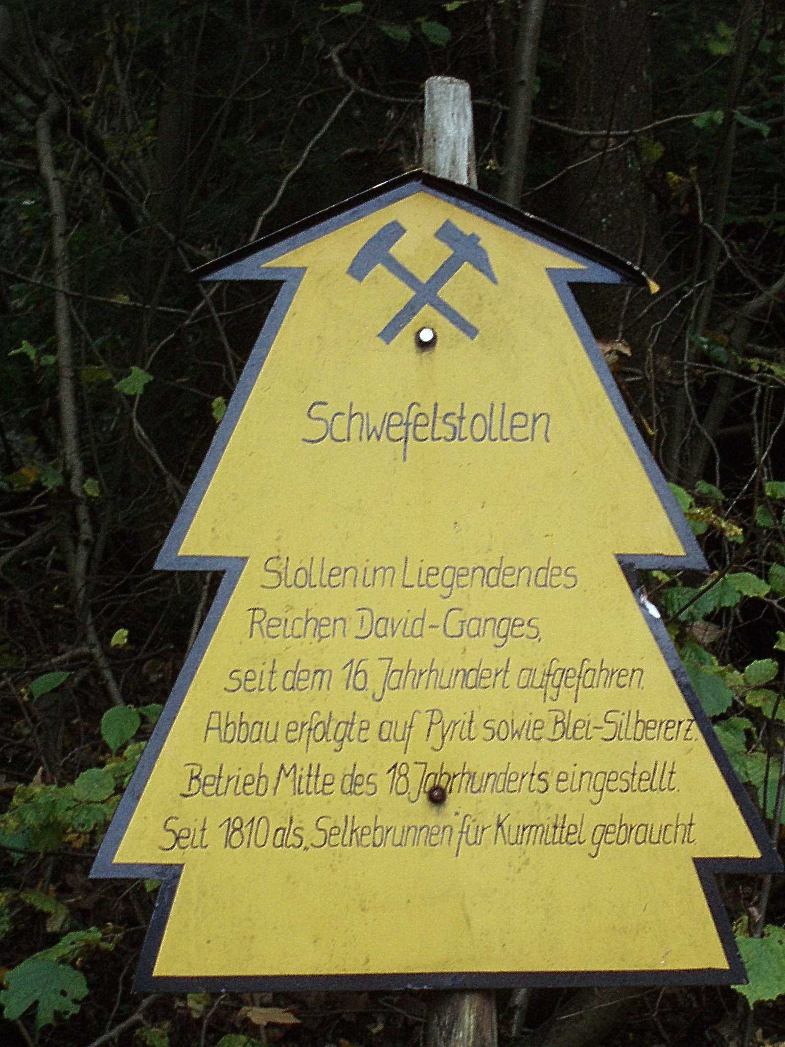 Dennert-Tanne Schwefelstollen. Alexisbad, Sachsen-Anhalt, Deutschland.